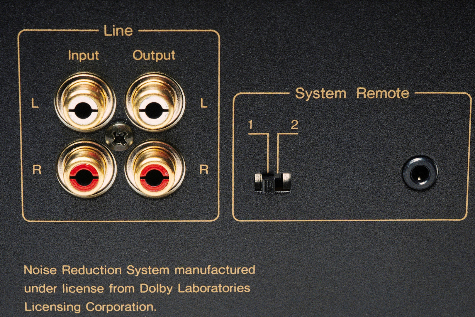 Entrée et sortie ligne d'un magnétocassette